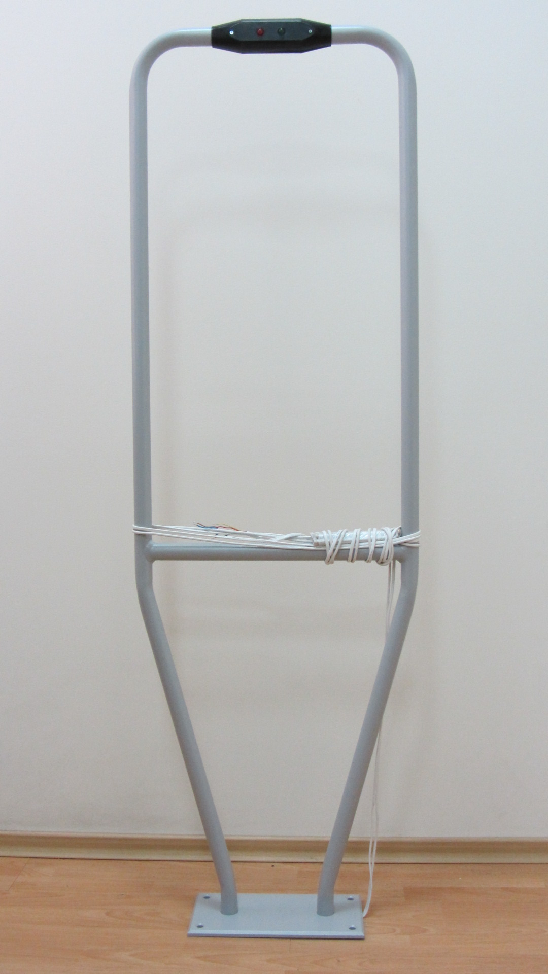 подобные считыватели служат для организации проезда автотранспорта, поскольку благодаря увеличенной дальности считывания, не требуют поднесения идентификатора непосредственно к считывателю